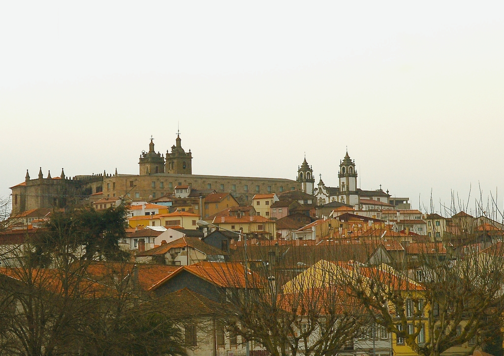 Vista General de Santa Maria de Viseu